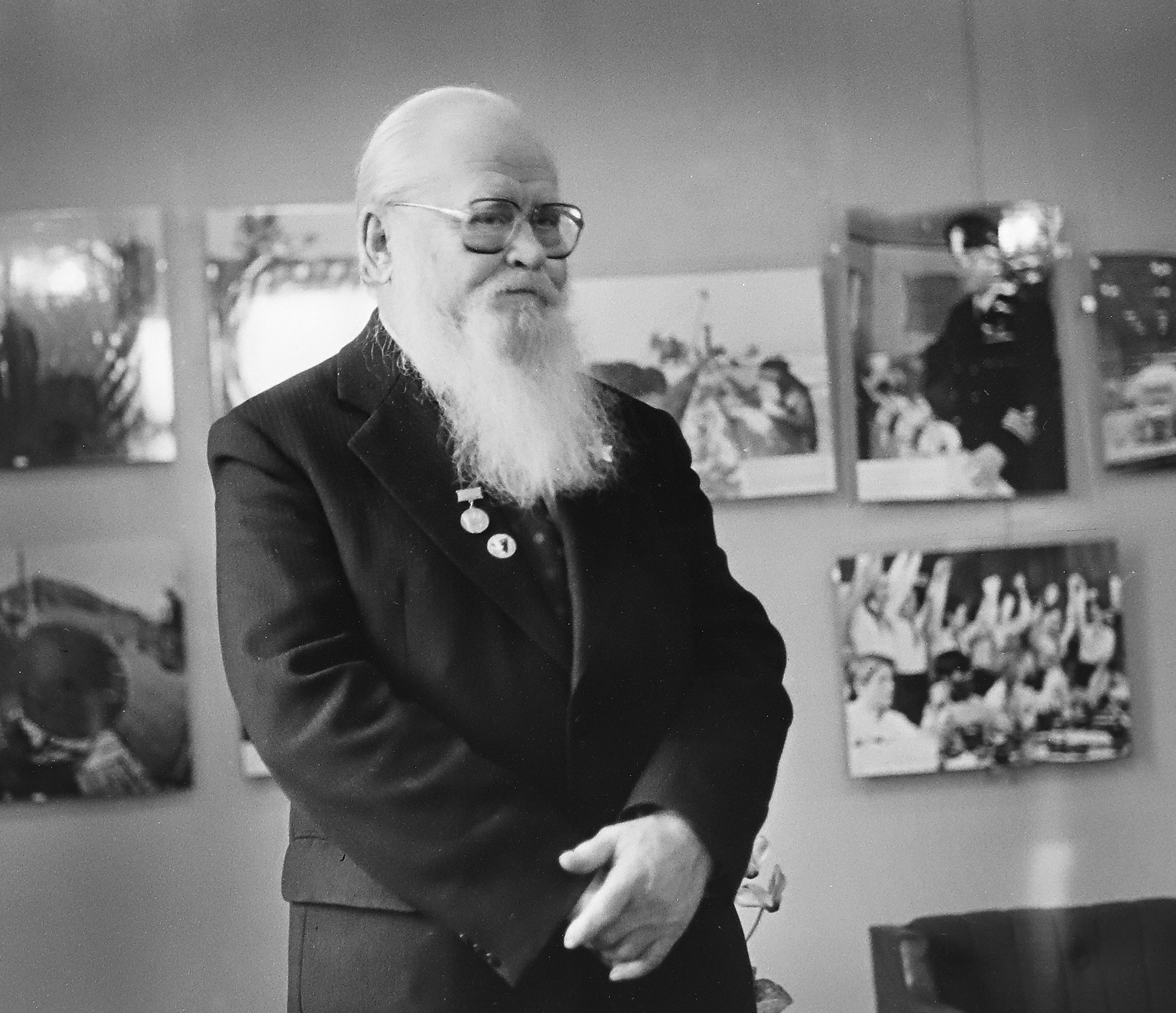 Endel Puusepp, Nõukogude Liidu sõjaväelendur 86